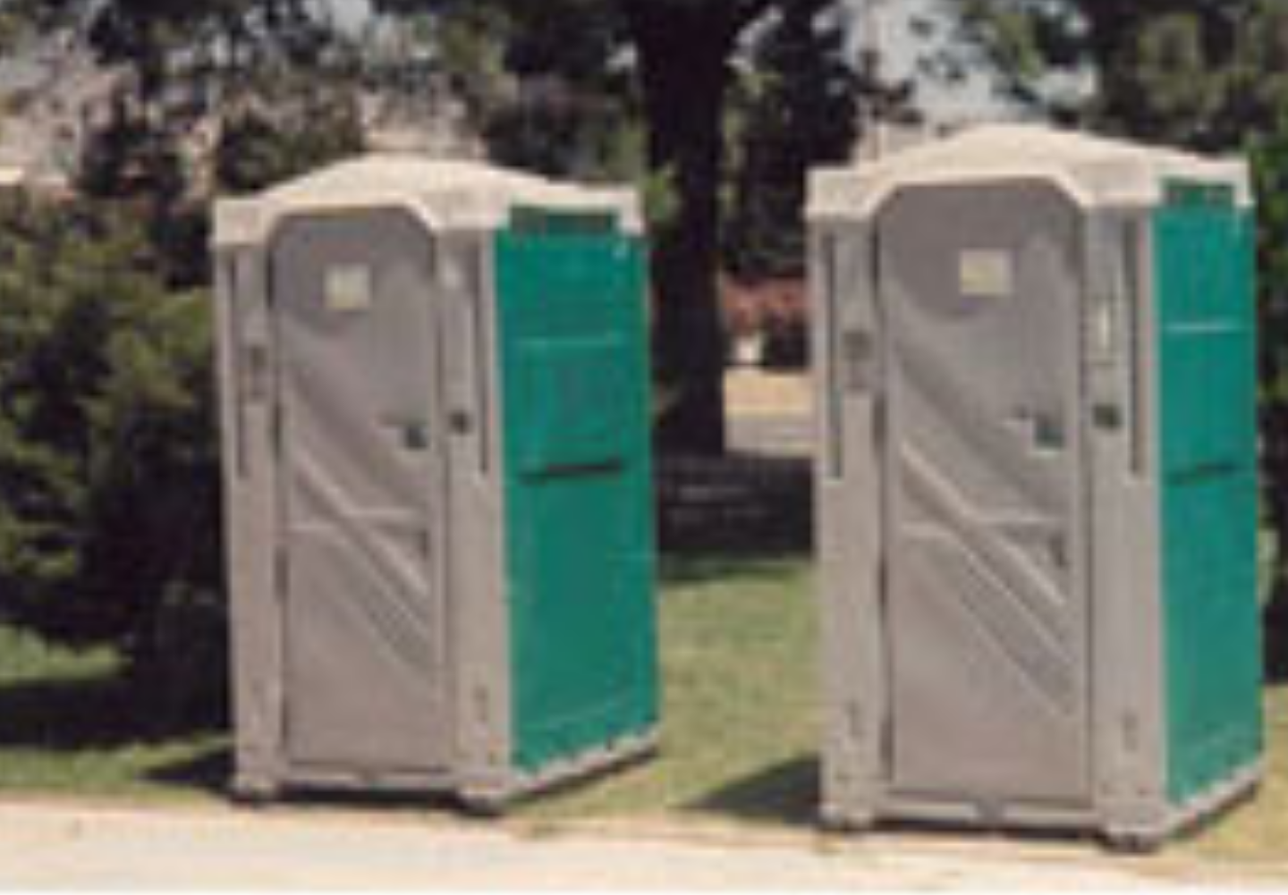 Xημικές τουαλετες στο Δήμο Αθήναιων (1996)